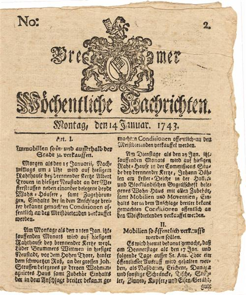 Die Bremer Nachrichten ist dem Titel nach die drittälteste noch erscheinende Zeitung in Deutschland.